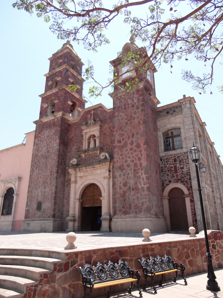 San Diego de la Unión, Guanajuato, México.